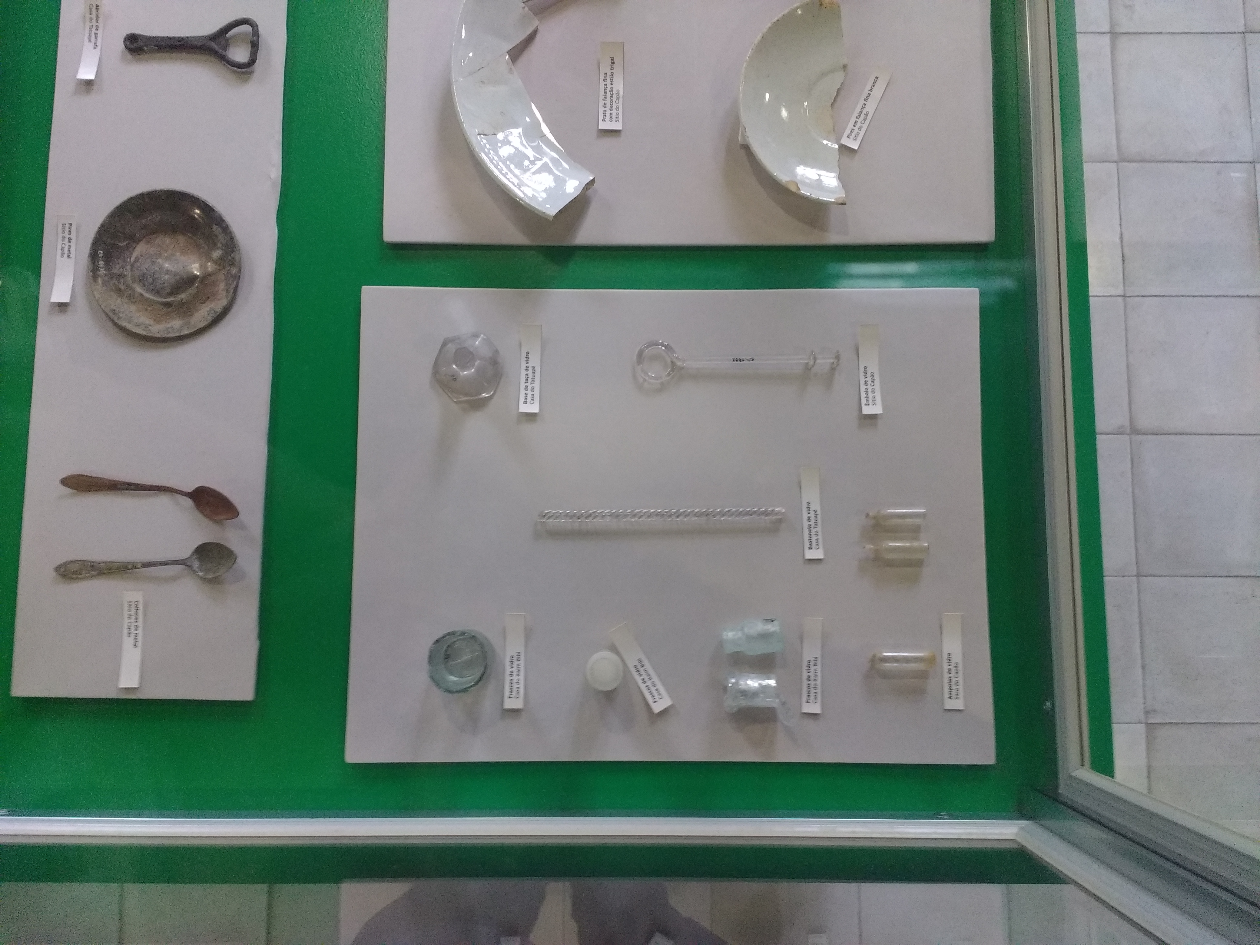 Artefatos do periodo beneditino encontrados no Sitio Morrinhos